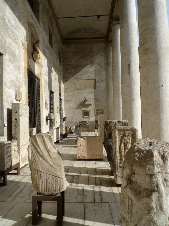 Museo Lapidario Maffeiano in Verona: Ausstellungsstücke in der Vorhalle zur Philharmonie